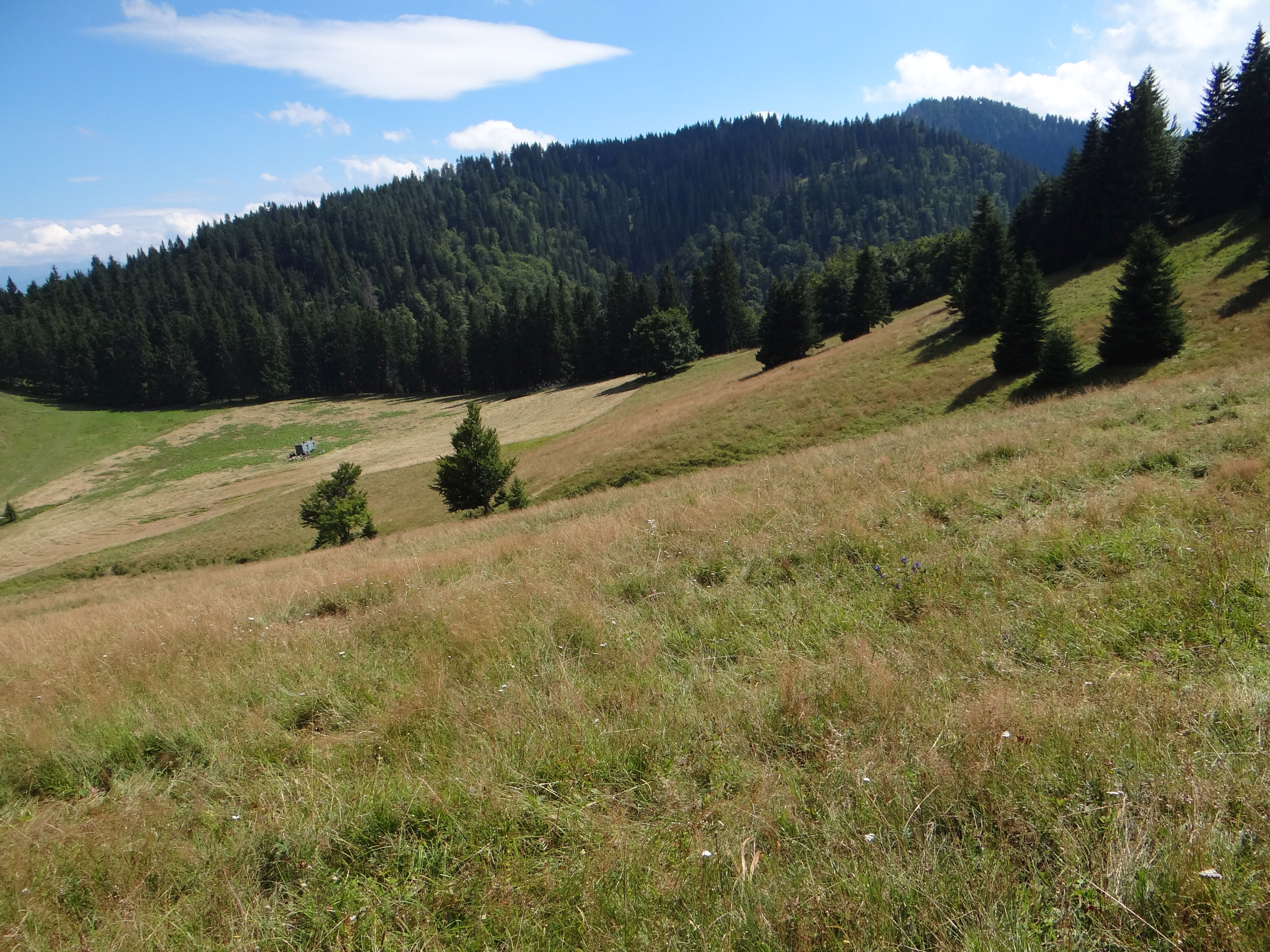 Madarová, Šiprúň